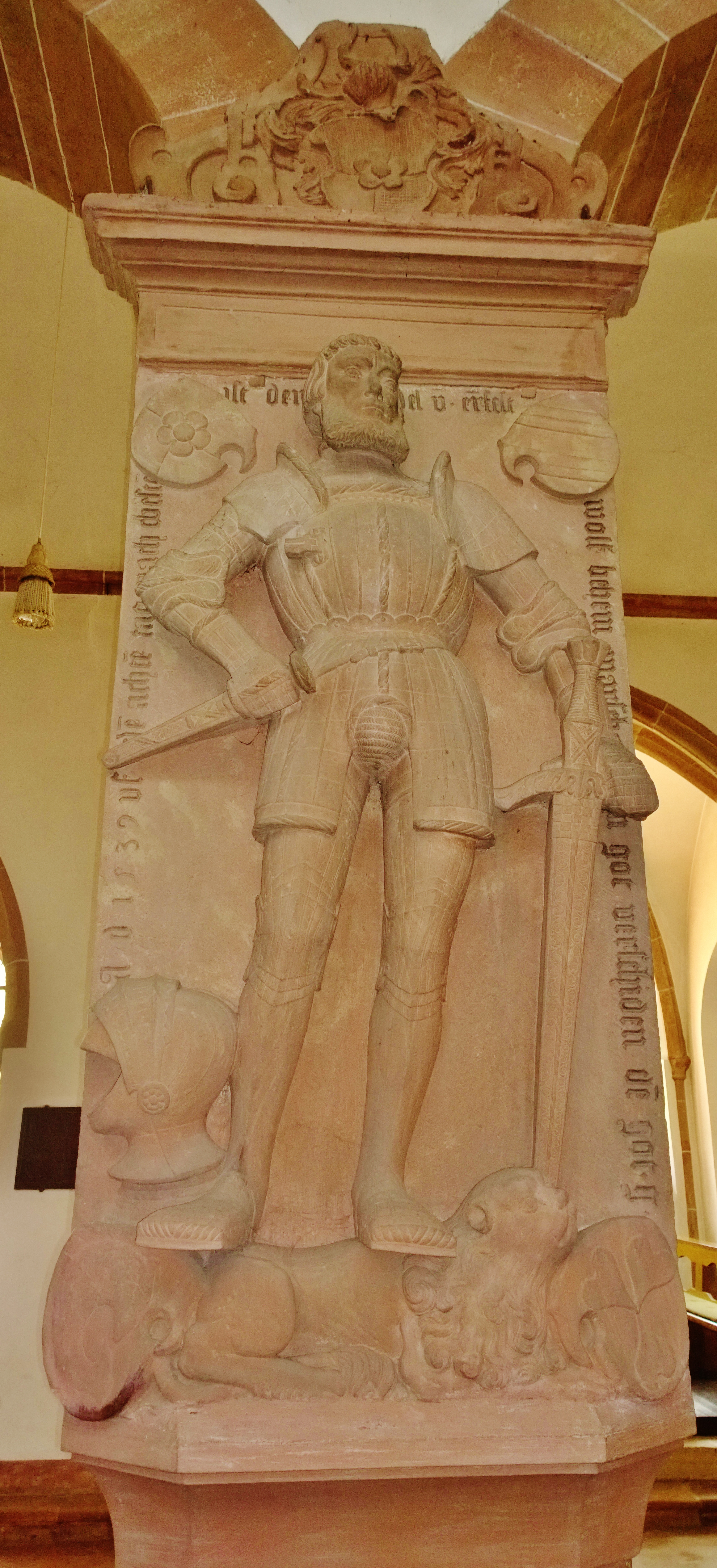 Wolf Behem von Mörle (gest. 1539), Lehensbesitzer von Schloss Wörth, Mainzer Hofmarschall